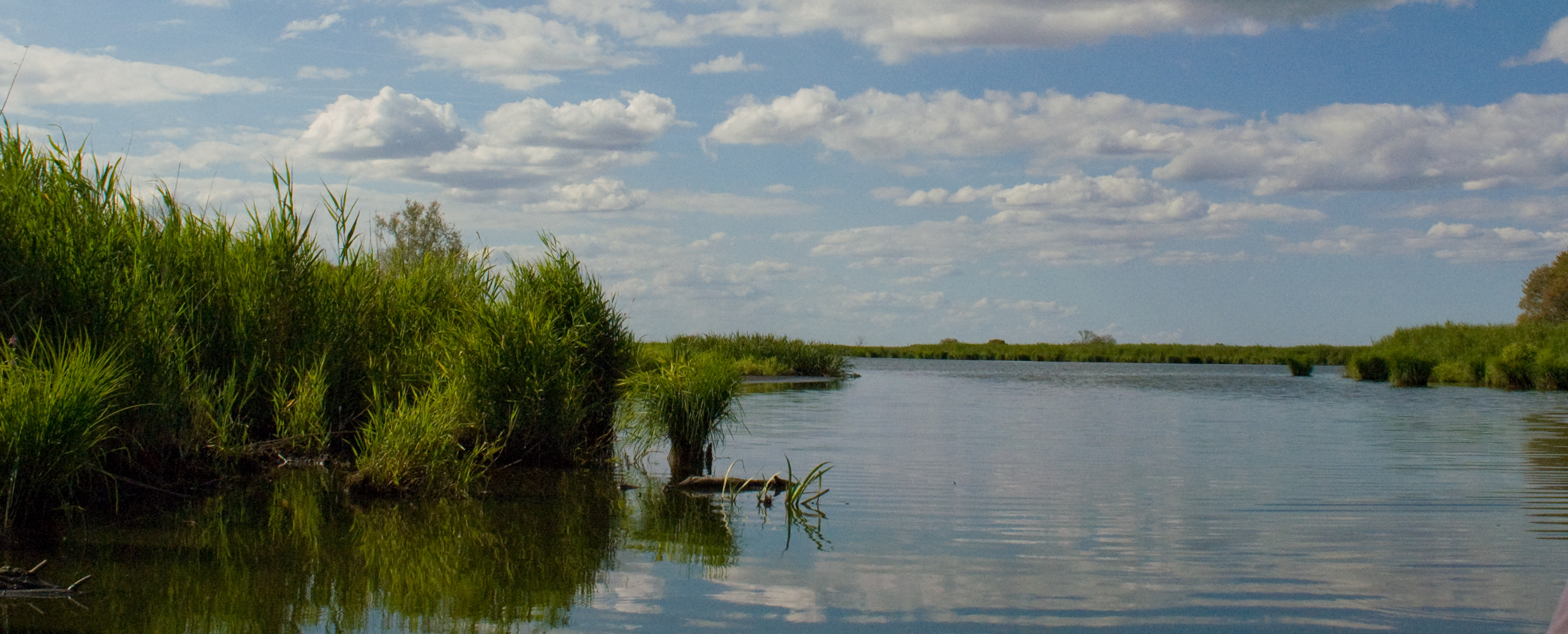 Parc naturel régional de la Brière.